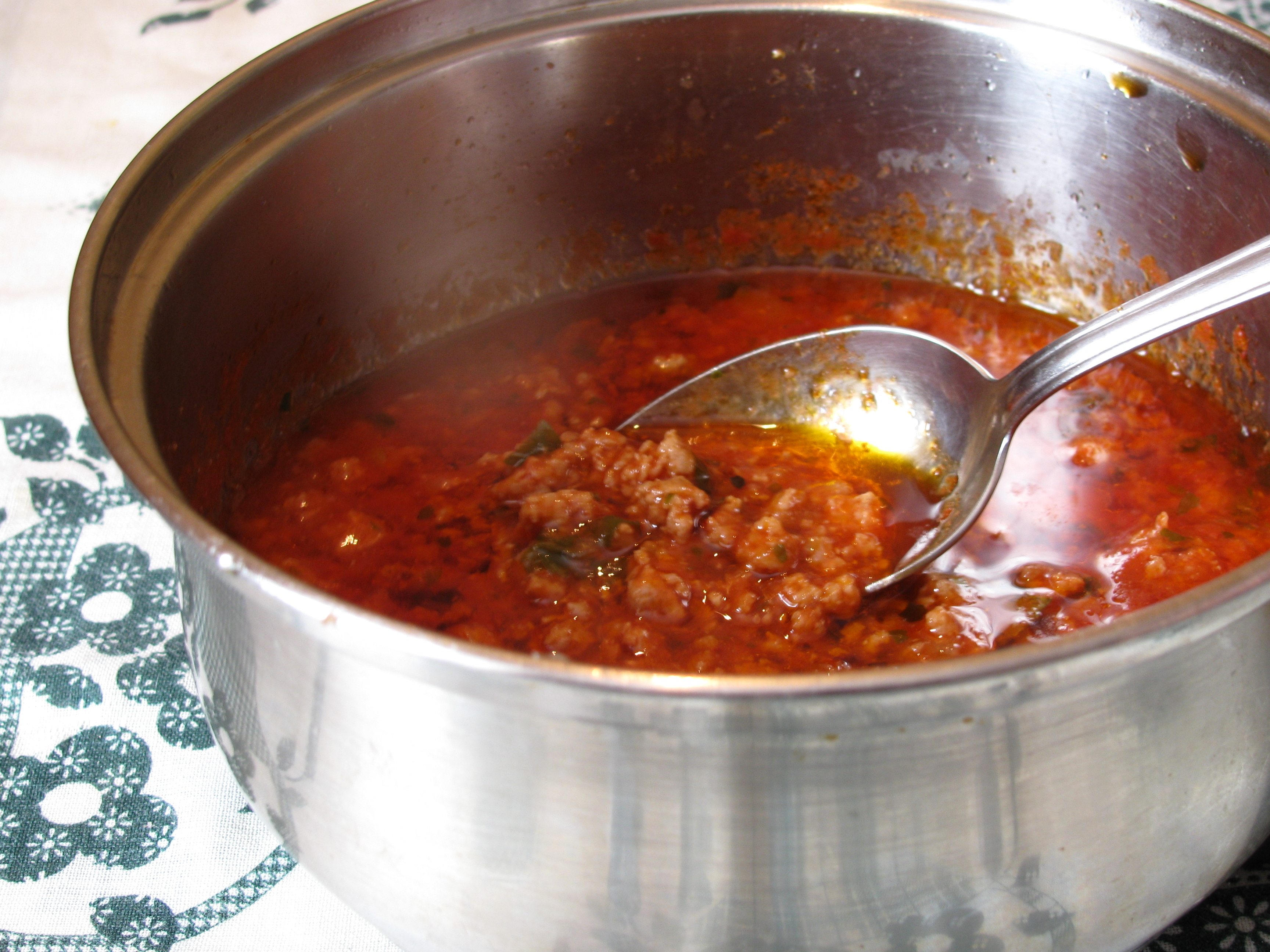 Рагу по-неаполітанськи: М'ясна страва італійської кухні